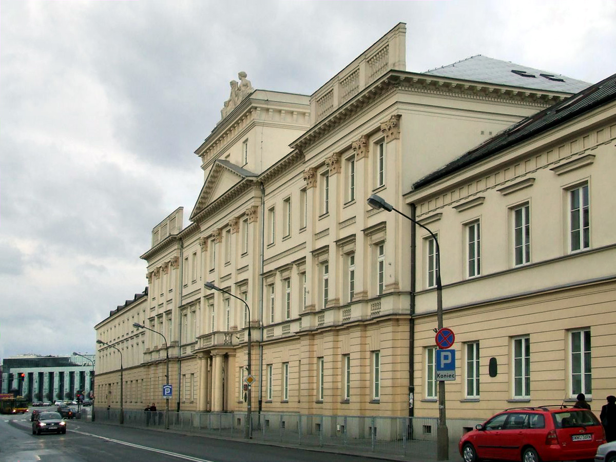 gmach Collegium Nobilium z lat 1743-54 - ul. Miodowa 24